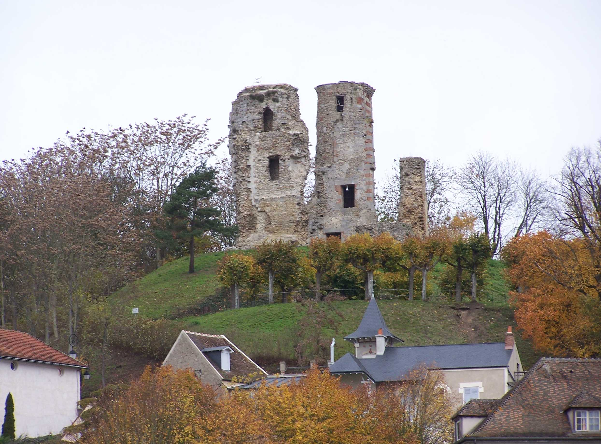 Ruines du château de Montfort-l'Amaury (Yvelines, France)- devant, la maison au clocheton de Maurice Ravel